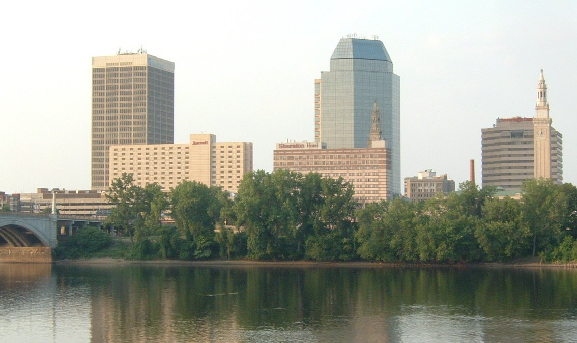 Springfield, Ma, USA skyline